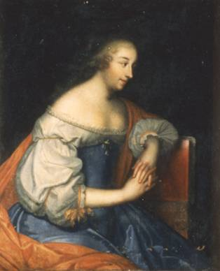 Gilonne Marie Julie d'Harcourt (1619-1699) Dame d'honneur (sans gages) d'Anne d'Autriche de 1640 à 1652 et dame d'honneur de mademoiselle de Montpensier, Née en 1619, Décédée le 16 octobre 1699 À l'âge de 80 ans Parents Jacques d'Harcourt, marquis de Beuvron 1585-1622 Eléonore Chabot, dame de Saint-Gelais Mariages et enfants Mariée en janvier 1632 avec Louis de Brouilly, marquis de Piennes +1640, dont Marie de Brouilly de Piennes 1637-1672 Mariée en 1643 avec Charles Léon de Fiesque, comte de Lavagne 1613-1658 (2 autres fils morts jeunes), dont Jean Louis 1647-1708 Nn Relation en 1656 avec Philibert, comte de Gramont 1621-1707